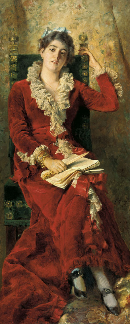 Портрет жены художника Юлии ПавловныМаковской 1881